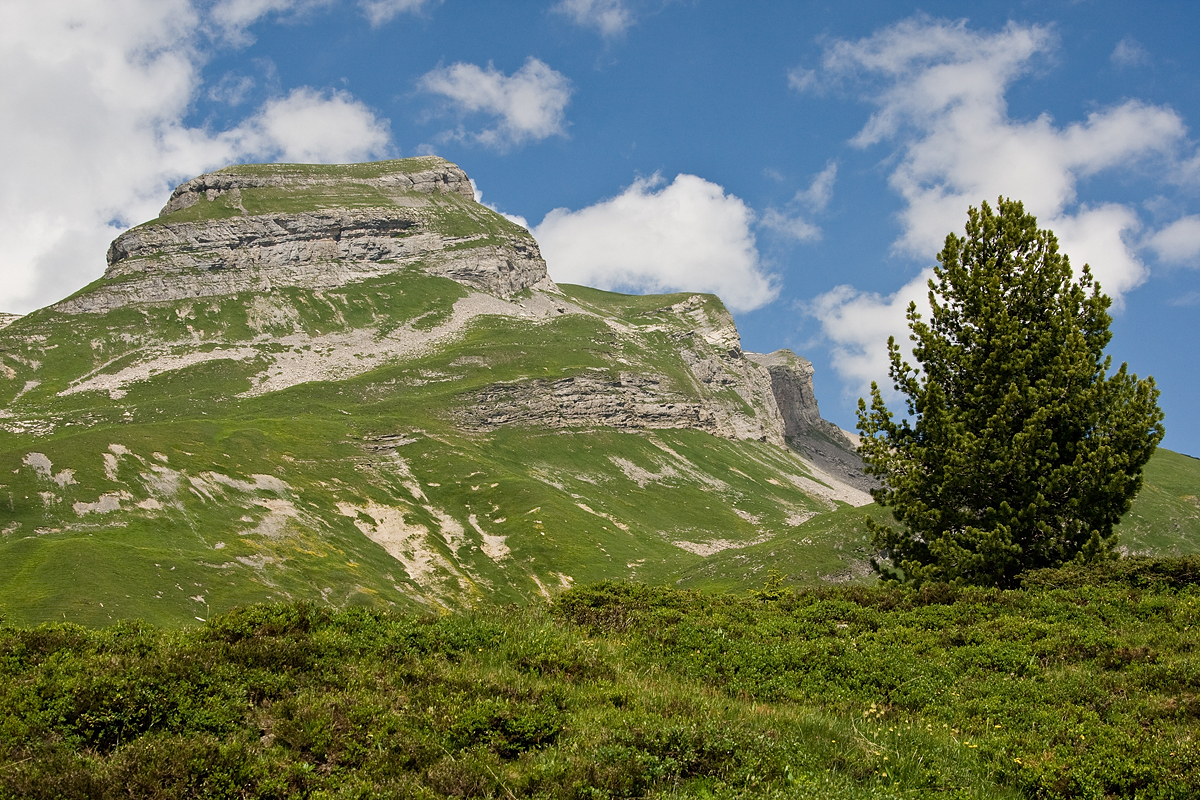 Gwärtler, gut sichtbar von der Engstlenalp her